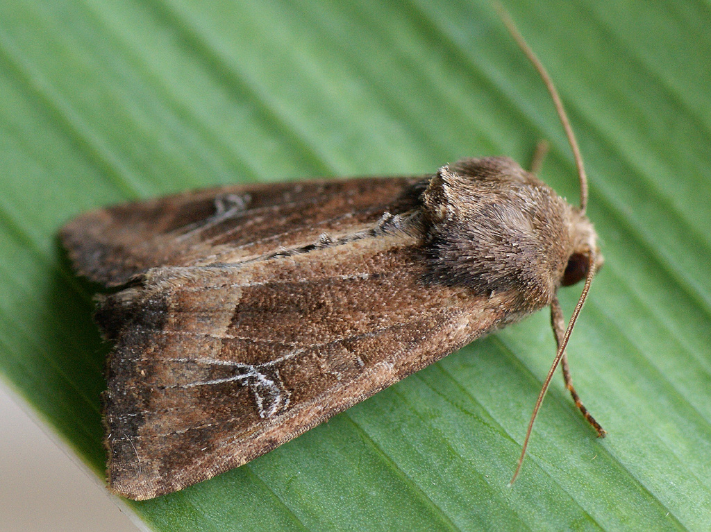 Exemplar found: Russia, Moscow Oblast, Odintsovsky District, near village Pestovo, 10.08.2014, by light МО, Одинцовский р-н, окрестности деревни Пестово, 10.08.2014, на свет